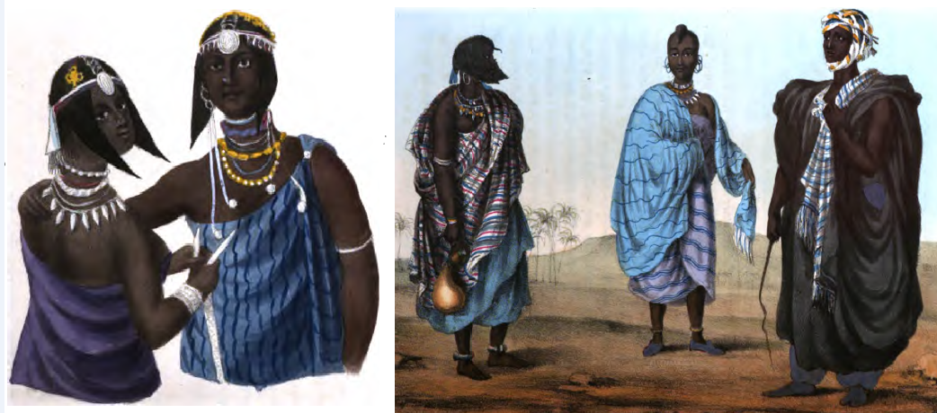 رَسم من الواقع للرحالة البريطاني جورج إف. ليون لرجال ونساء من التُبو في أزيائهم التقليديّة، في مدينة القَطْرون الليبيّة عام 1819م